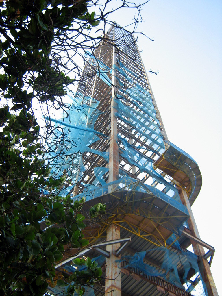 Torre de la Escollera 01/01/07